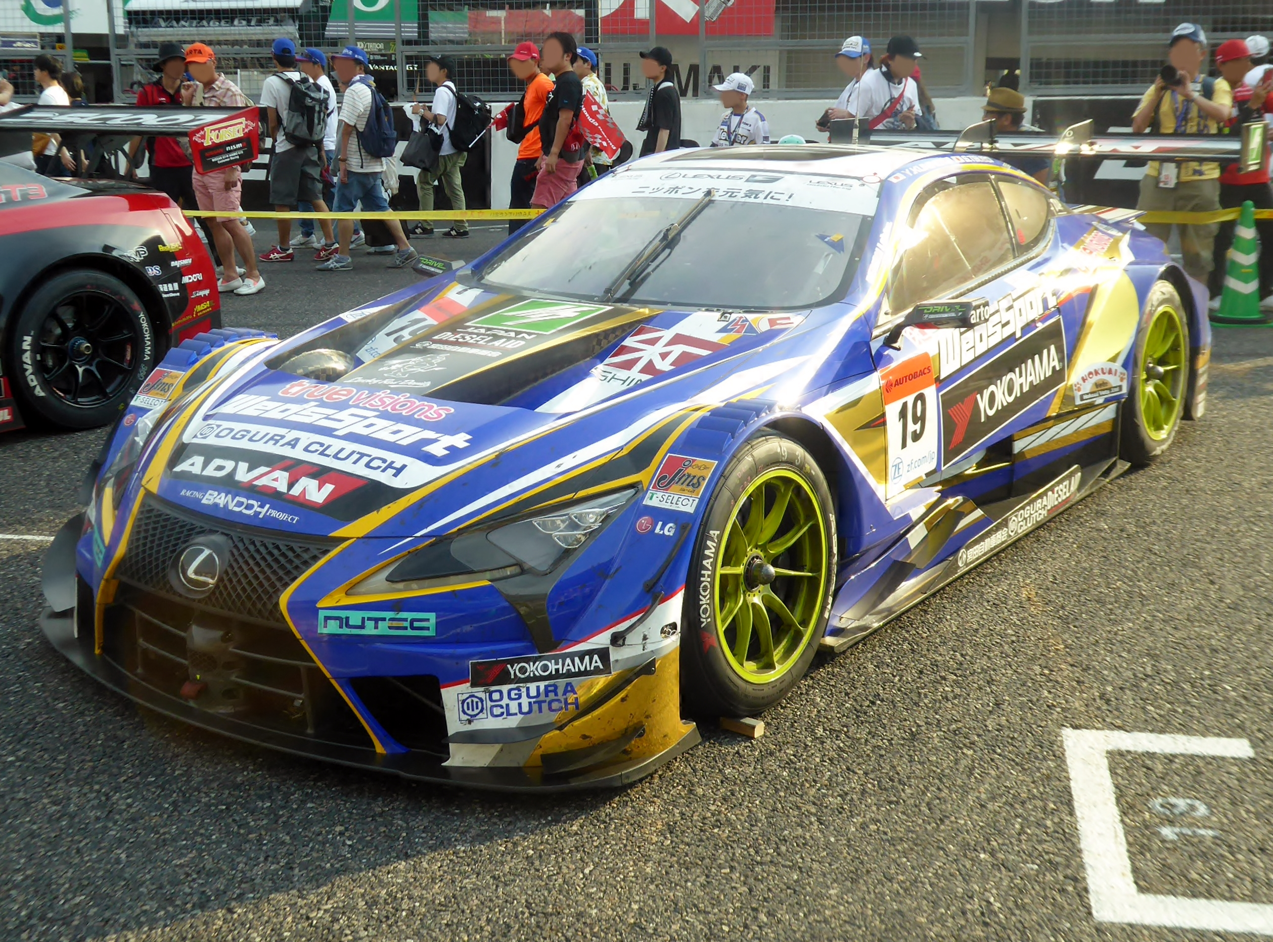 2019年鈴鹿GT300km終了後の19号車WedsSport ADVAN LC500を撮影。